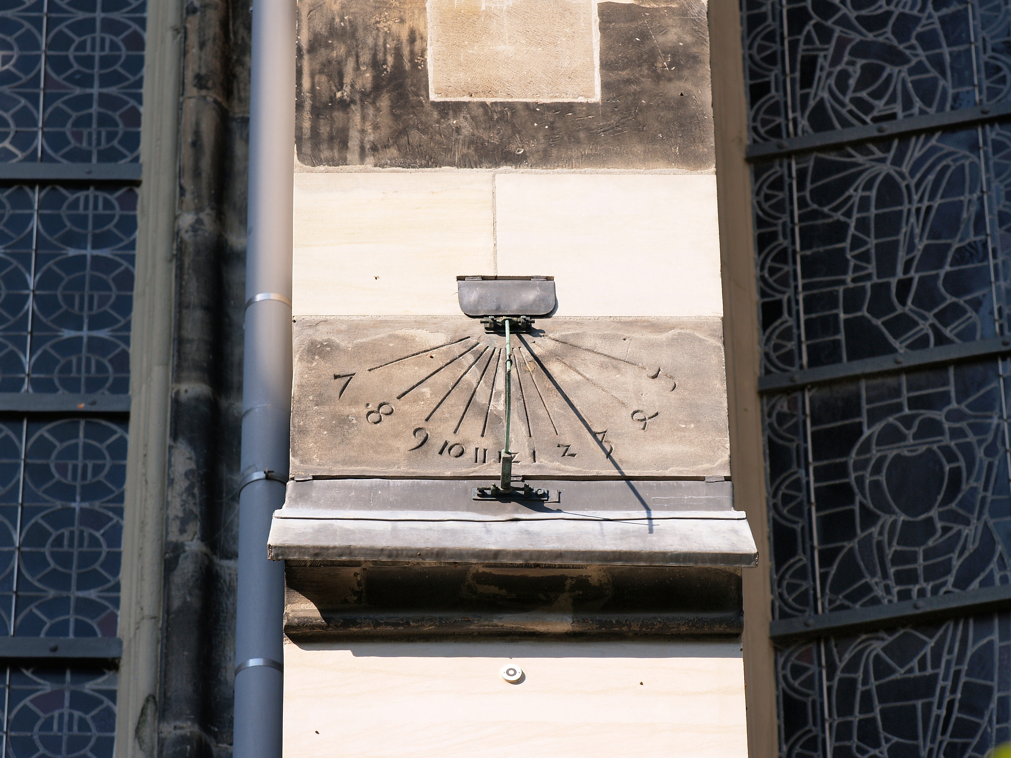 Sonnenuhr an der Südseite des Chores des Aachener Domes